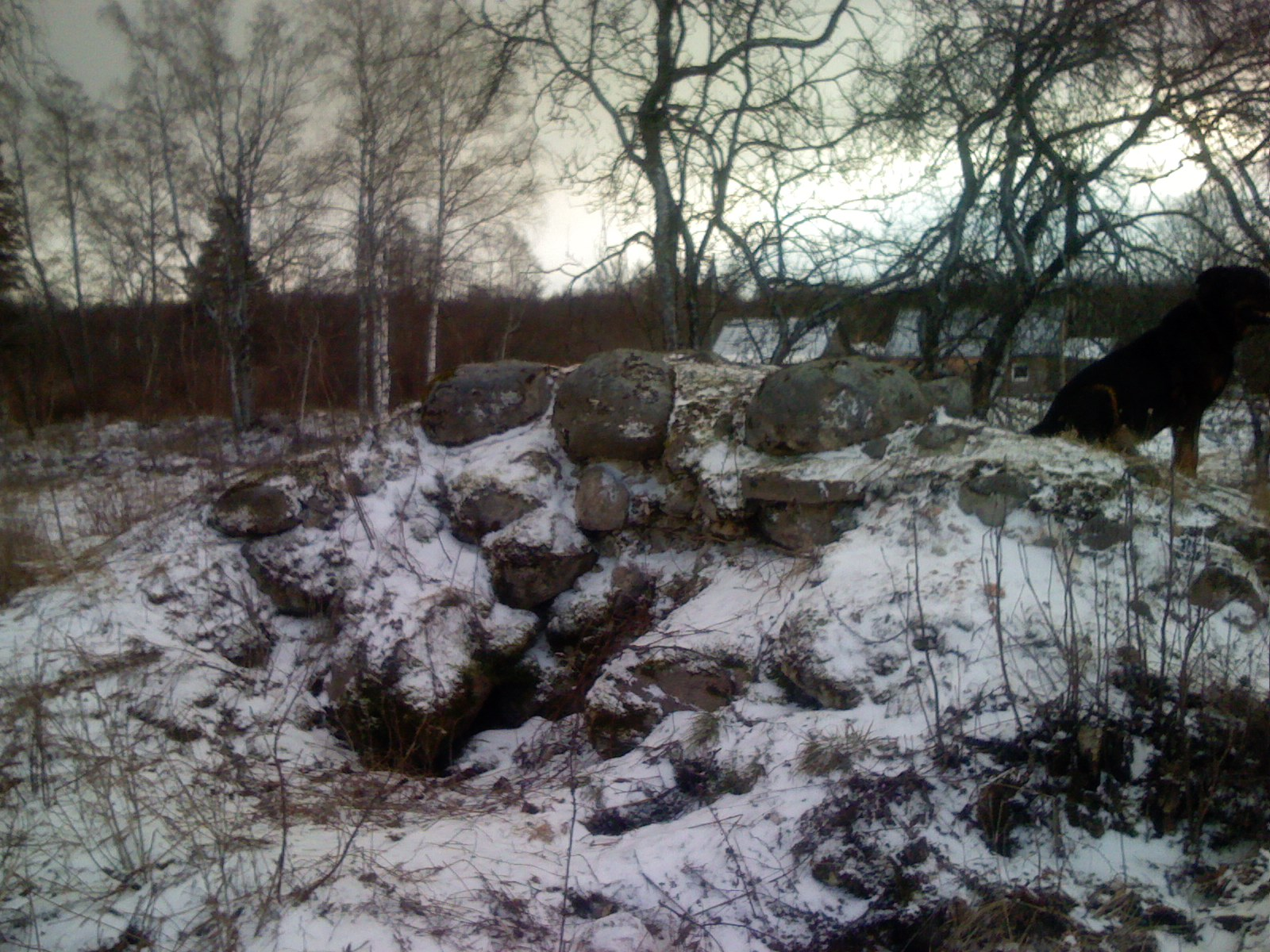 Osa Kärkna kloostri alusmüürist